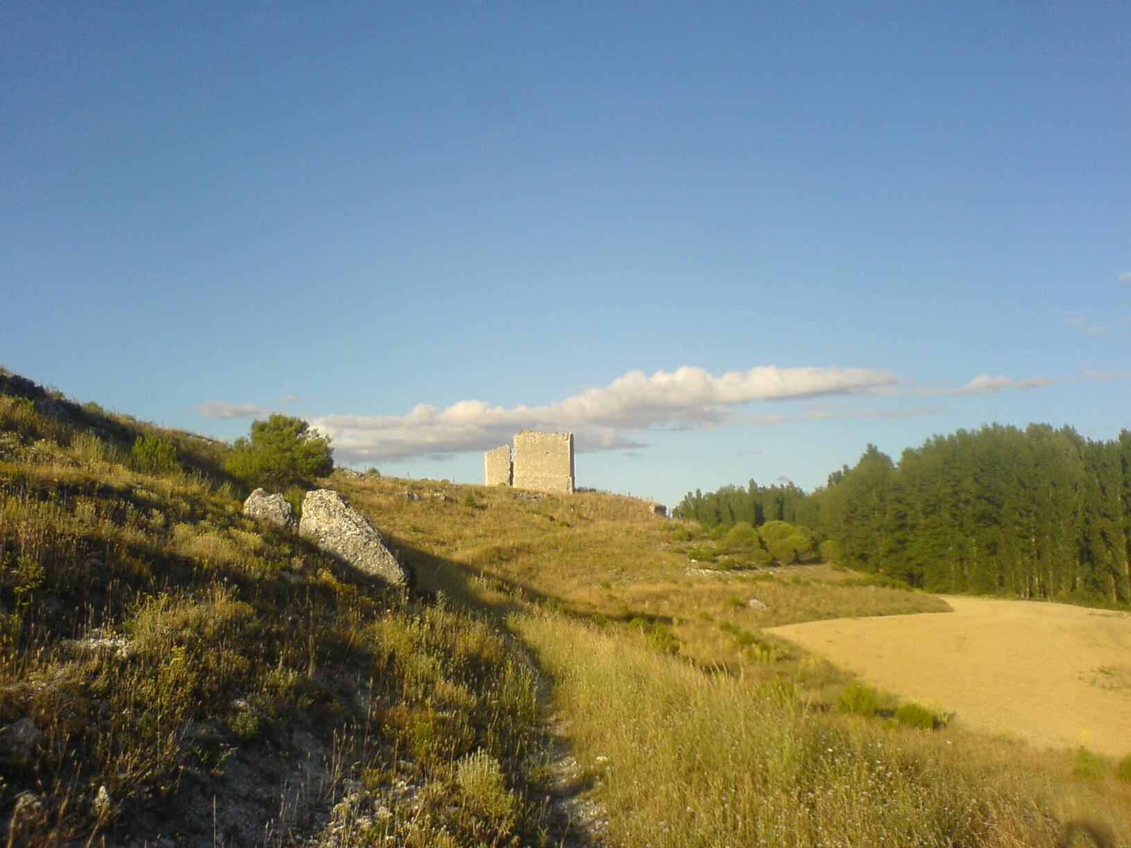 Ruinas del torreón de la iglesia de San Cristóbal de Minguela desde el frente.